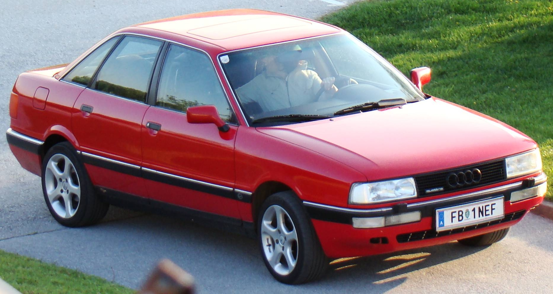 Audi 90 Quattro